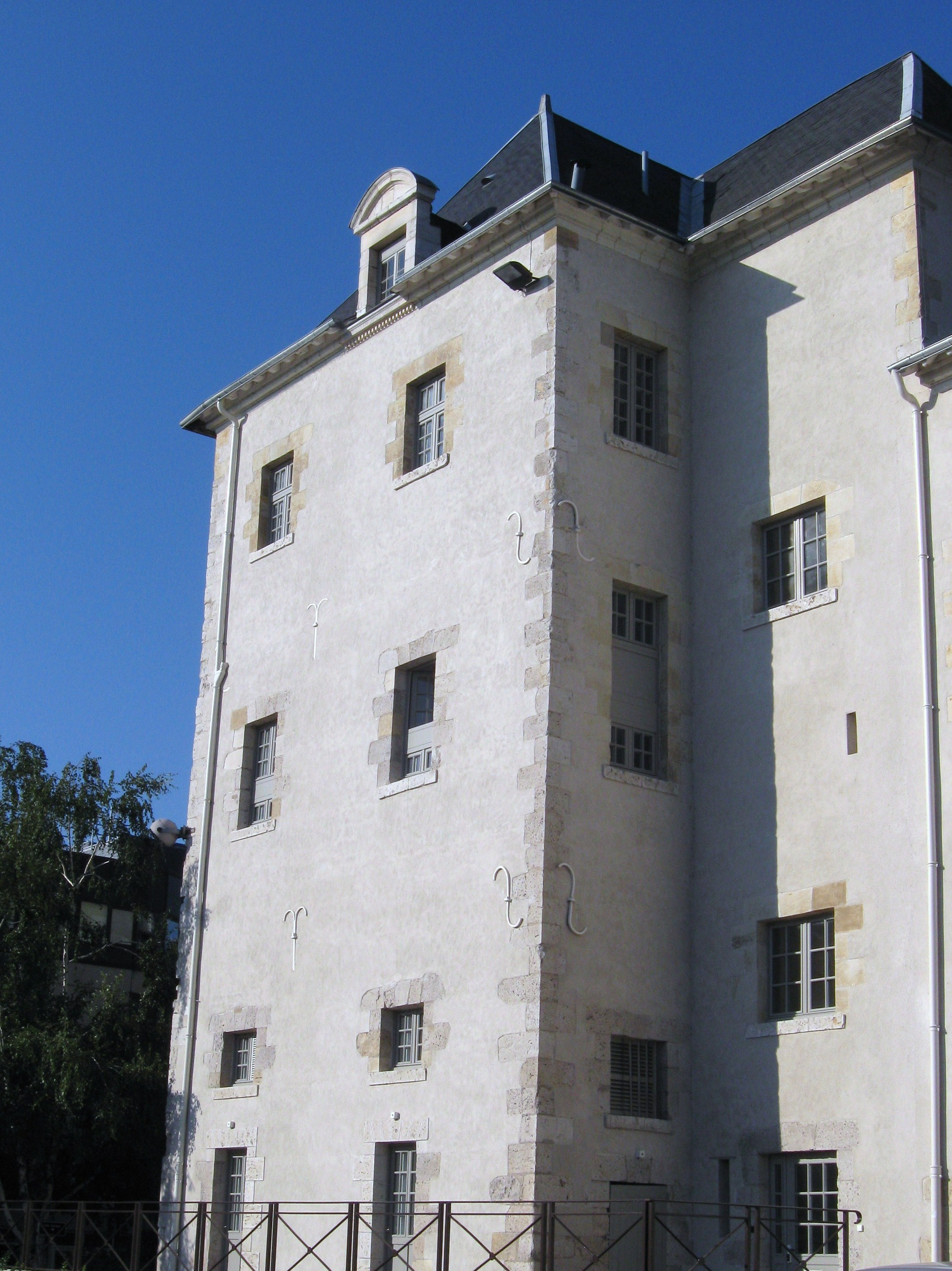 Hôpital Porte Madeleine, Orléans, Loiret, France